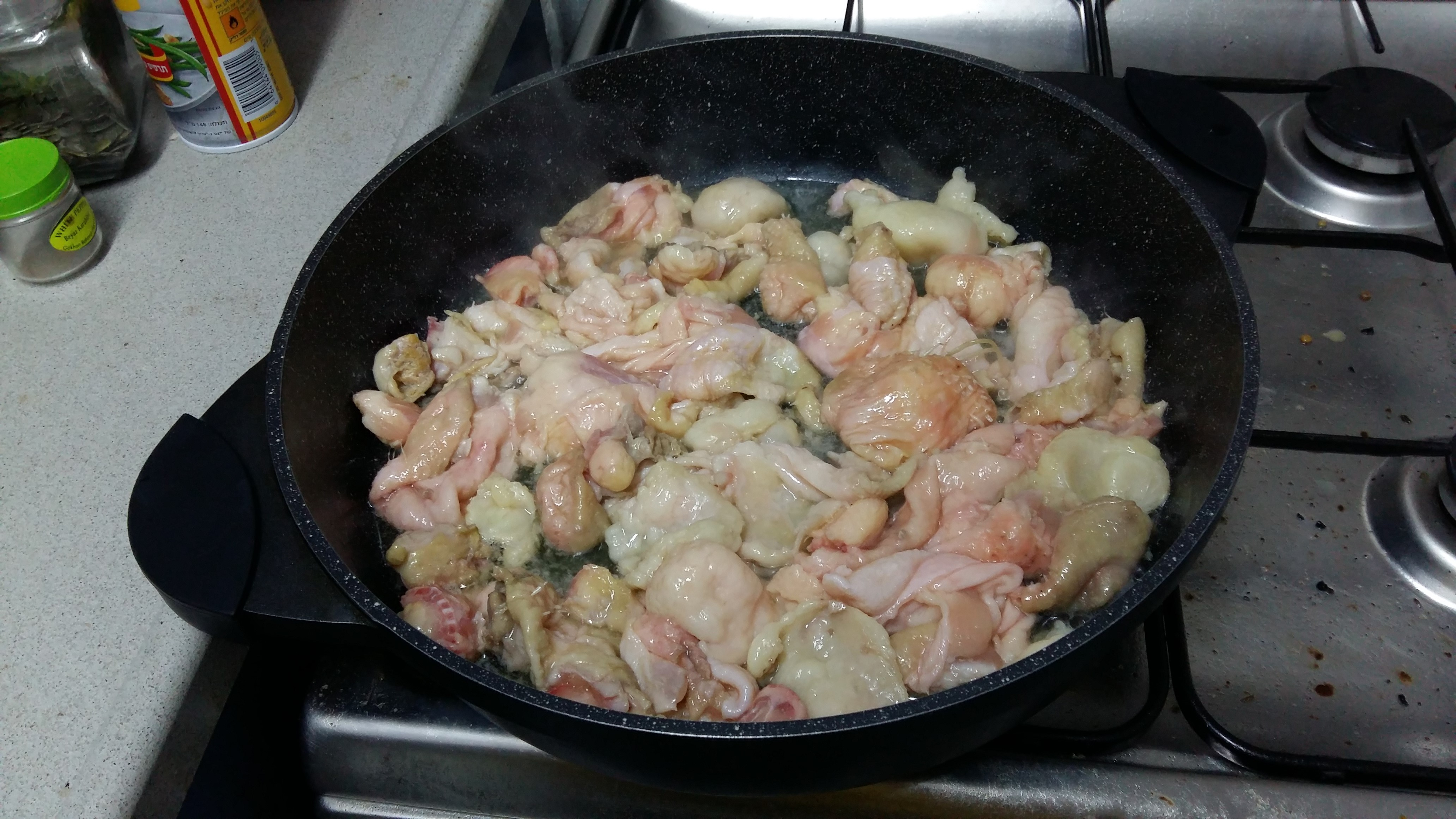 הכנת גריבען